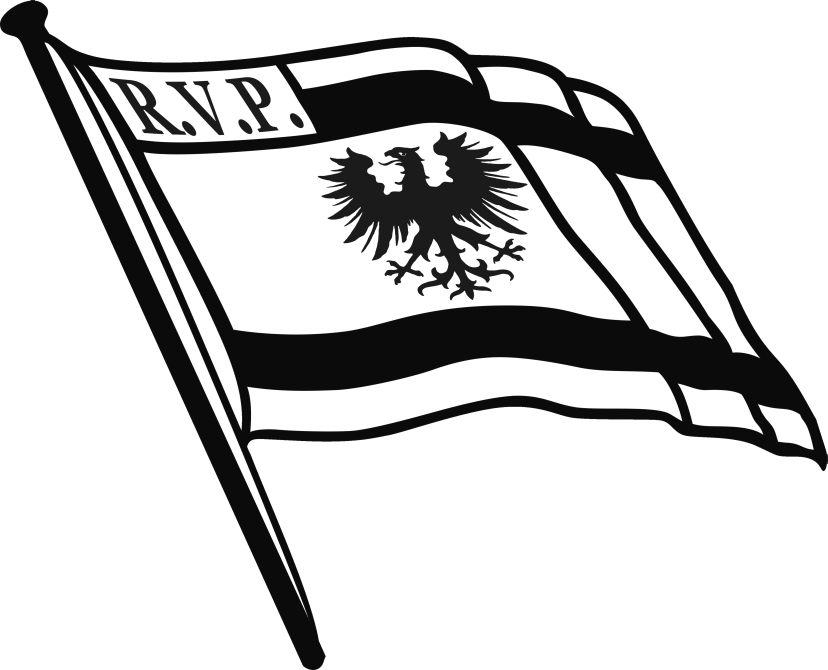 Dies ist die offizielle Flagge des Ruder-Verein "Preußen" e.V., Berlin.